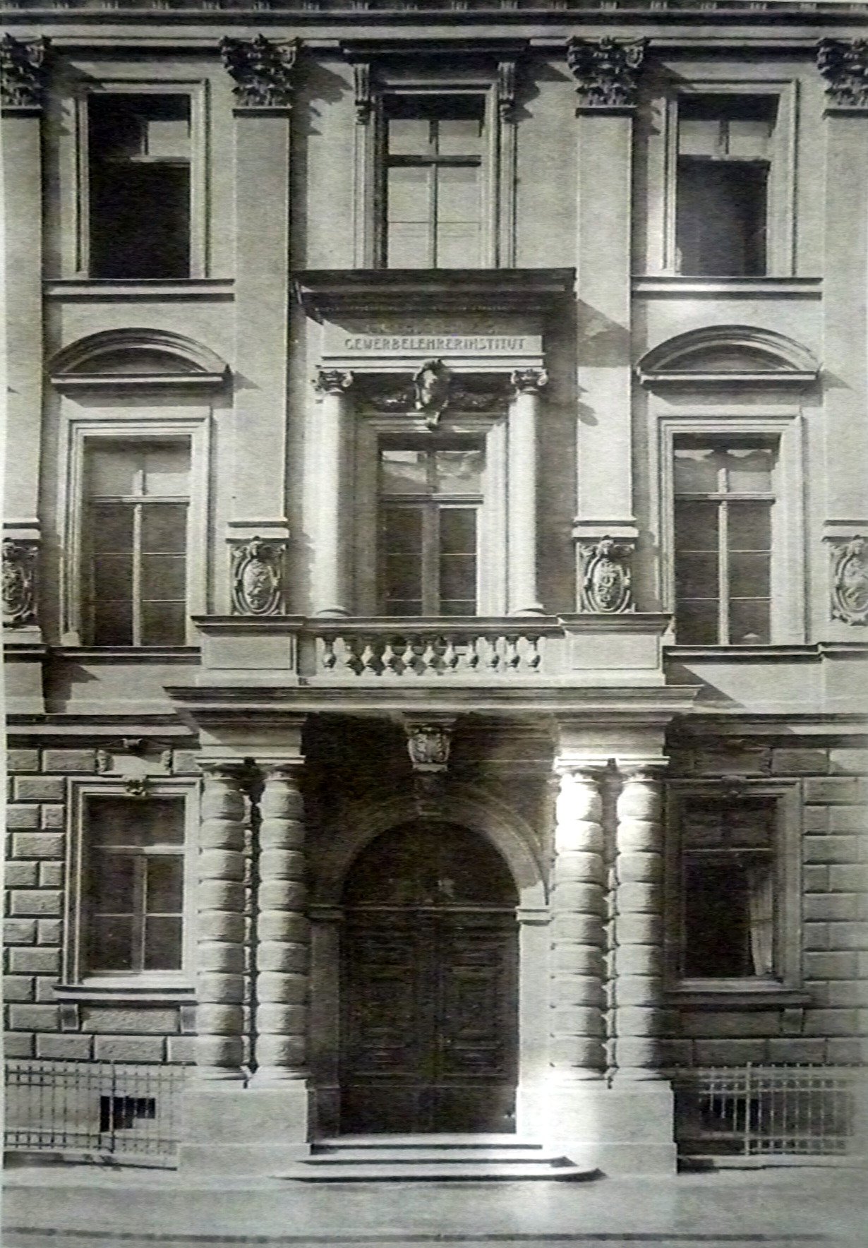 Eingang der Baugewerkschule München nach deren Umzug in die Gabelsbergerstraße.